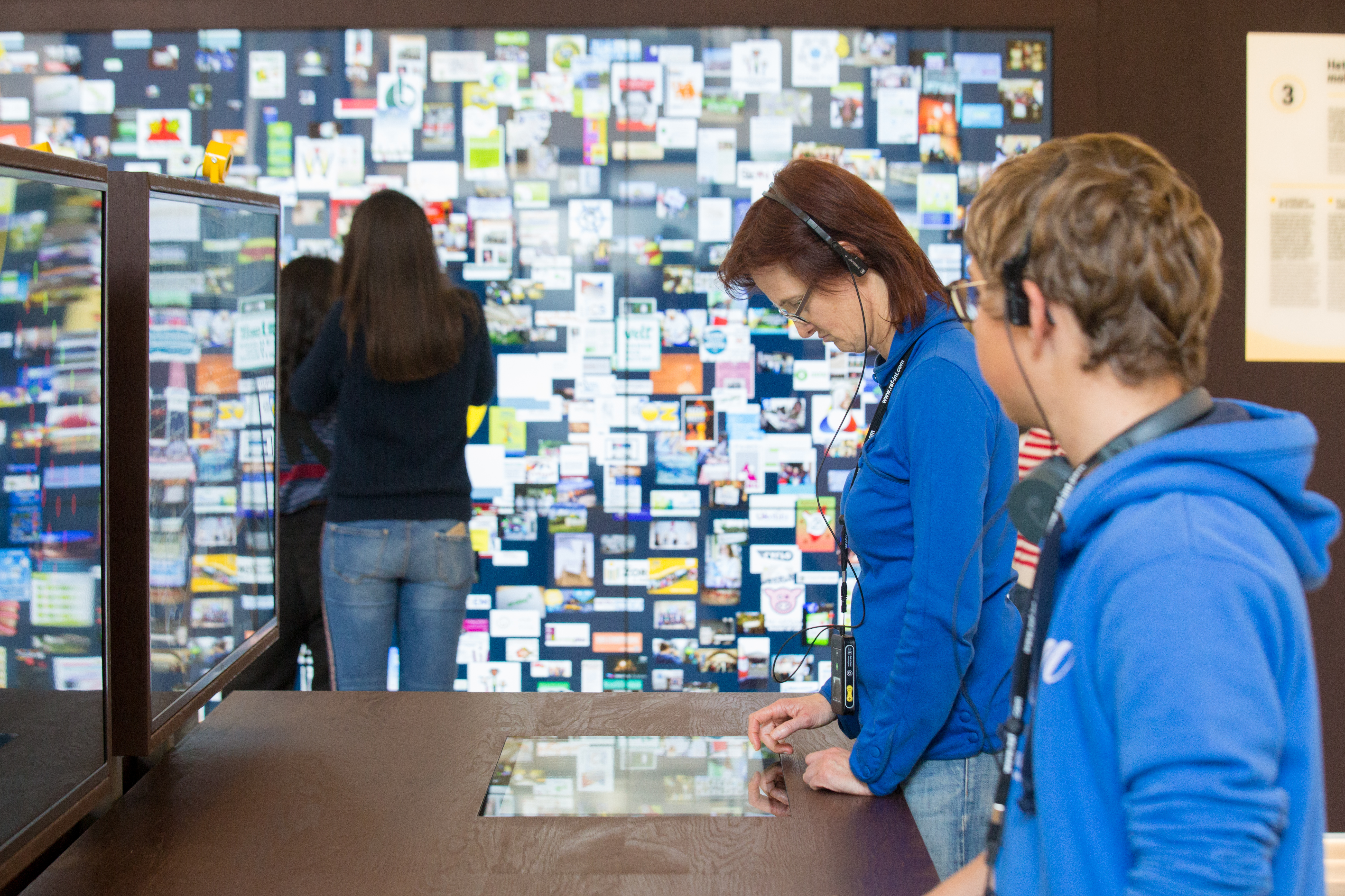 Hier zien we mensen die de tentoonstelling ontdekken.